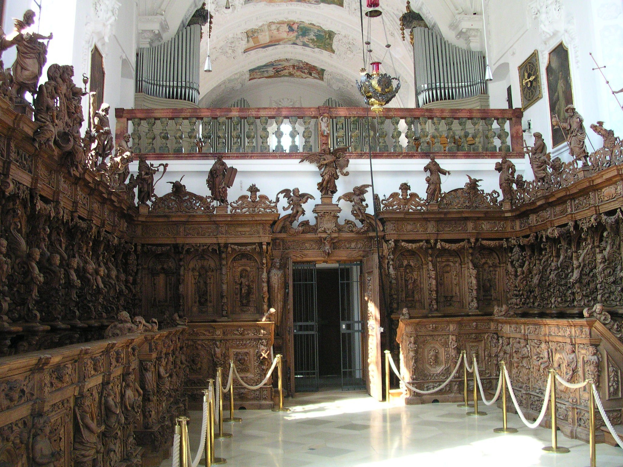 Chorgestühl im Kartausenmuseum Buxheim